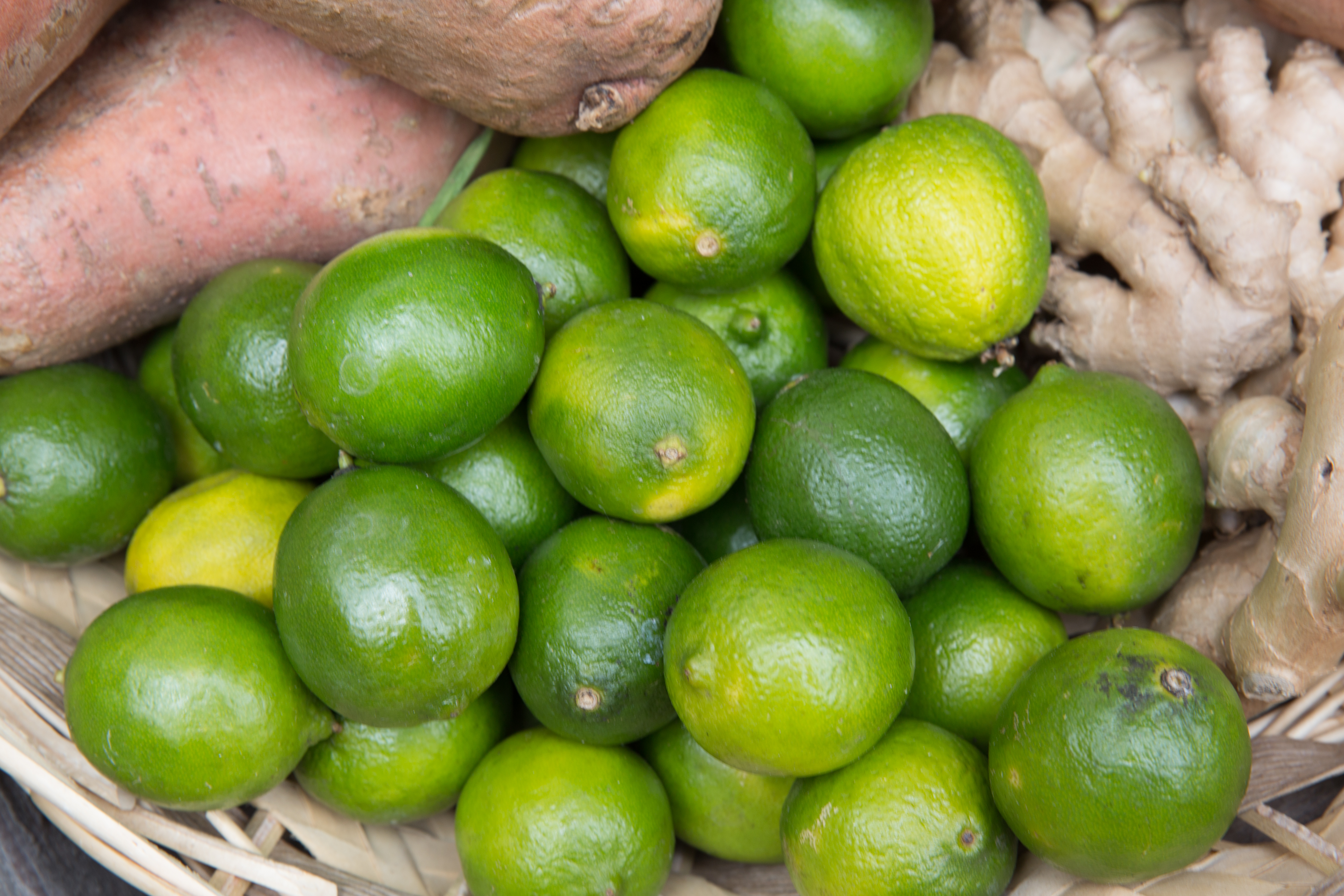 Limetten, Stadtmarkt Augsburg Juni 2015 The making of this work was supported by Wikimedia Austria. For other files made with the support of Wikimedia Austria, please see the category Supported by Wikimedia Österreich.